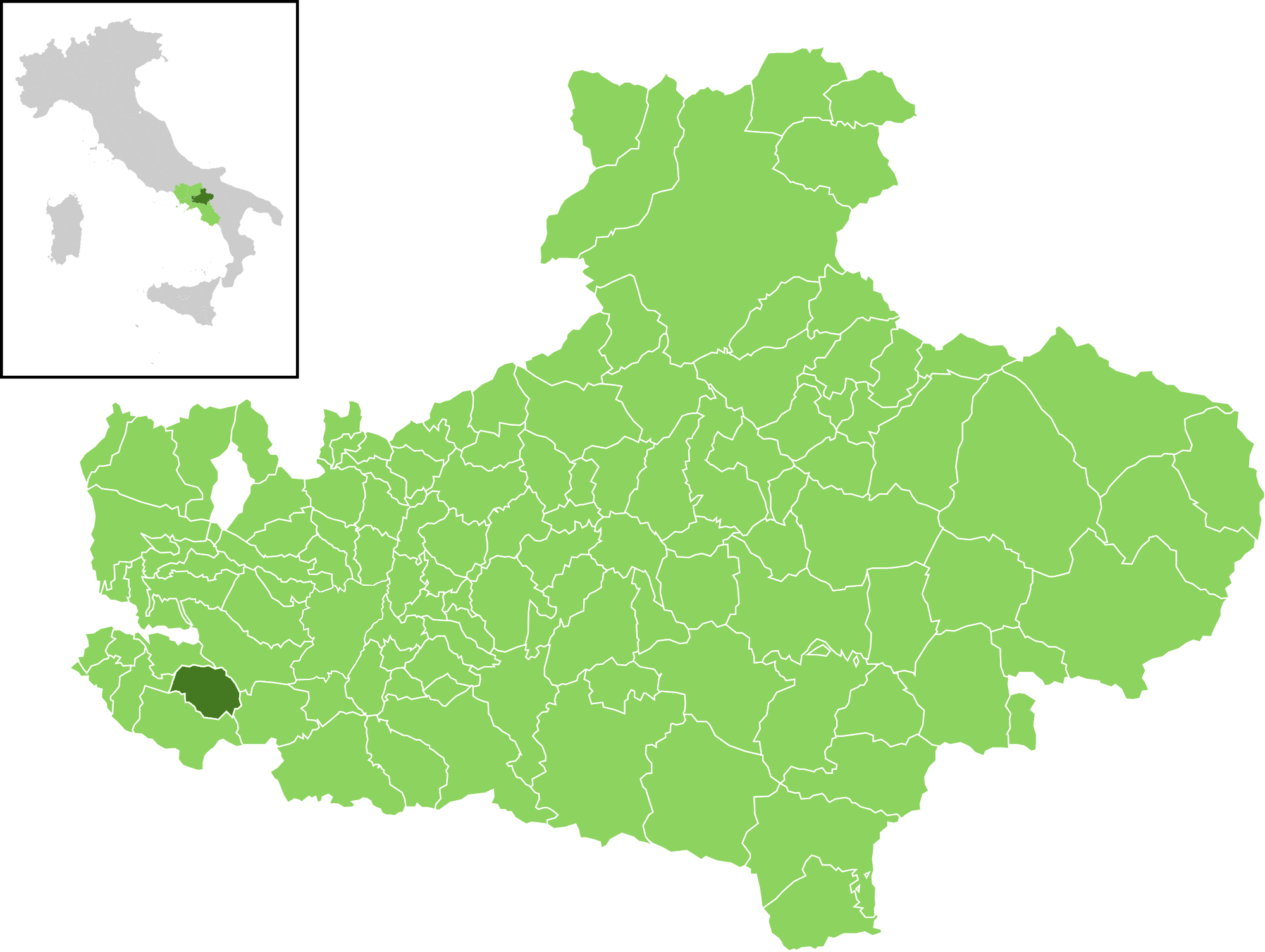 Posizione del comune all'interno della provincia di Avellino